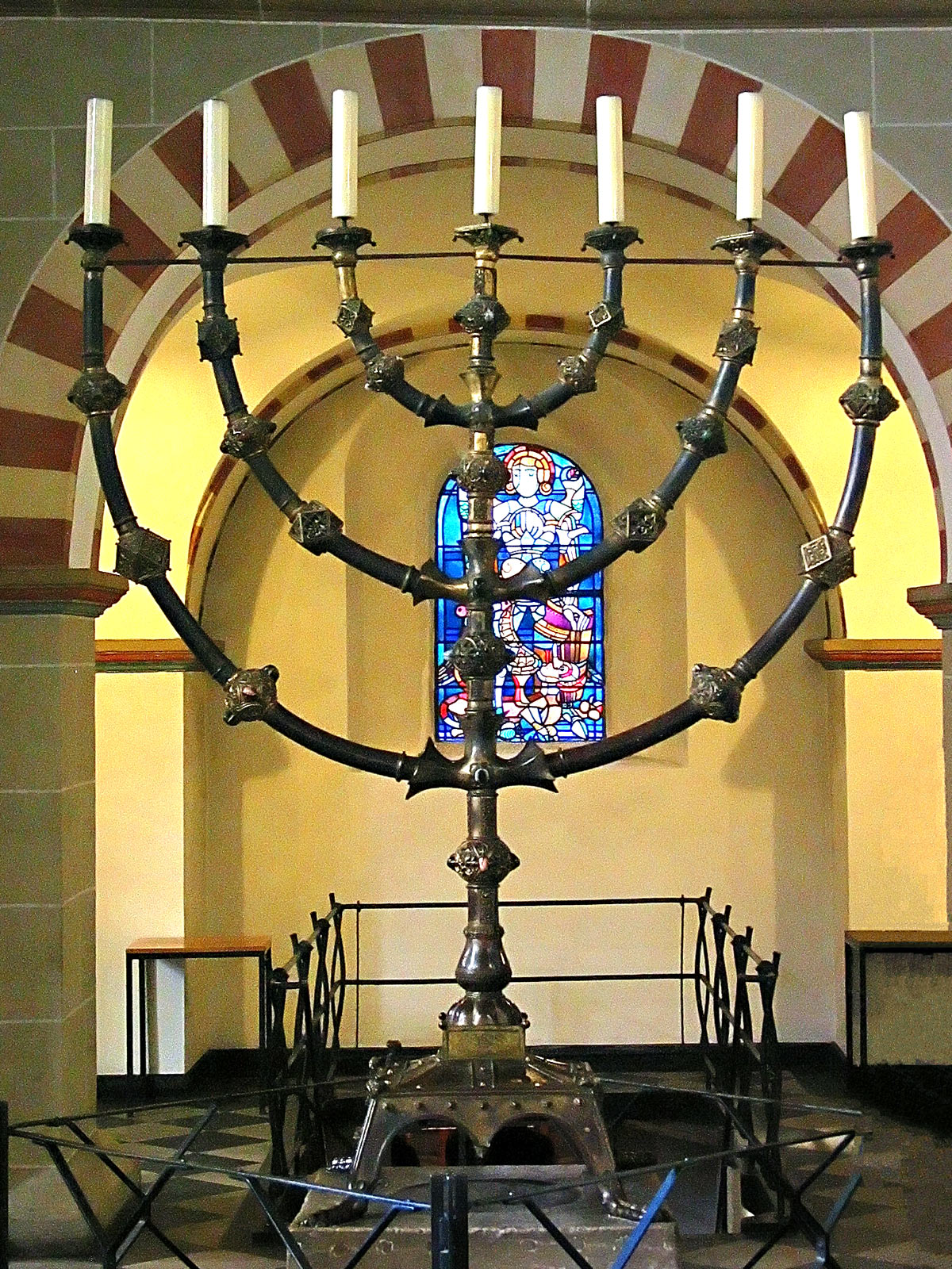 Siebenarmiger Leuchter, entstanden unter der Essener Äbtissin Mathilde, um 1000 nC.